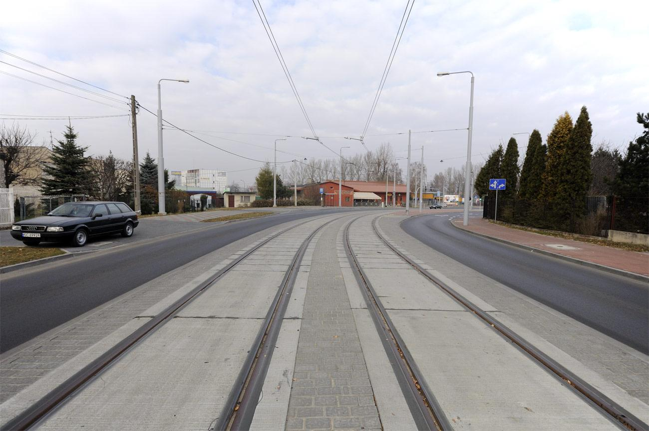 Nowa linia tramwajowa - na tym odcinku prawie gotowa. Ulica Orkana w pobliżu skrzyżowania z Jagiellońską.